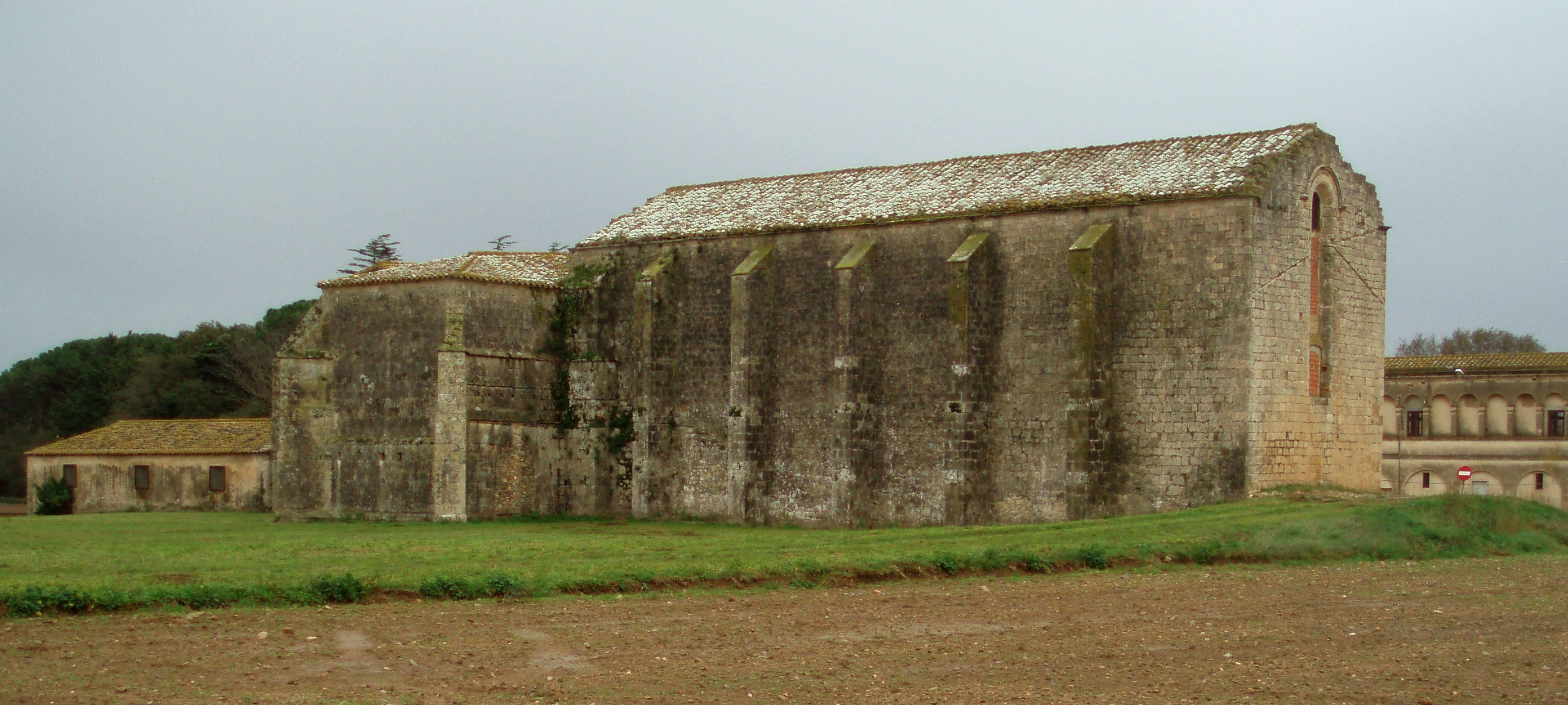 Fachadas norte y oeste de la nave de Santa María de Cadins